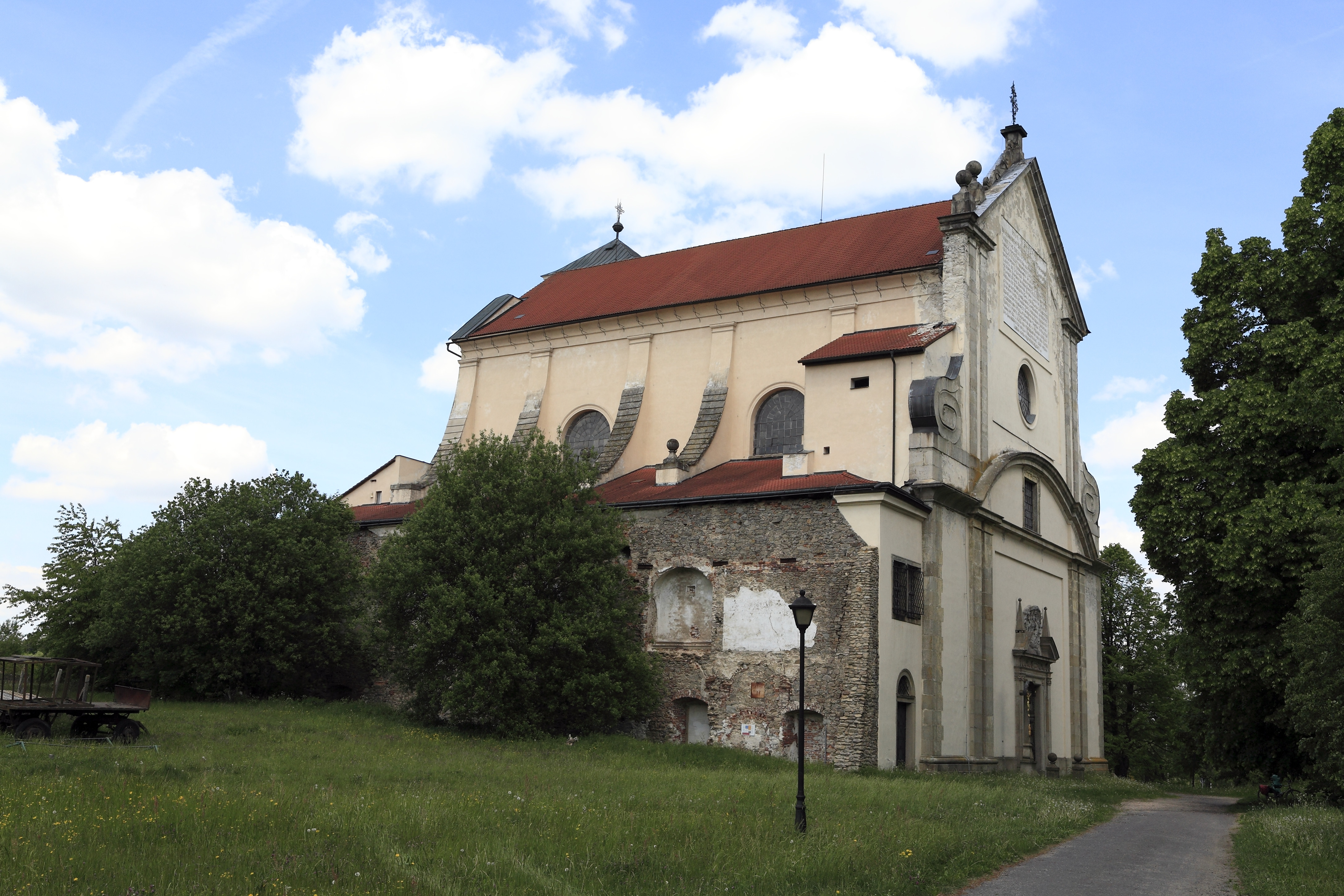 Ehemalige Klosterkirche des Paulinerklosters von Kloster, mit dem Ortsnamen war mal etwas einfallslos. Das Kloster wurde schon 1785 aufgehoben. 1959 sind die Klosterruinen abgebrochen worden, der Anschluss an die Kirche ist noch erkennbar.